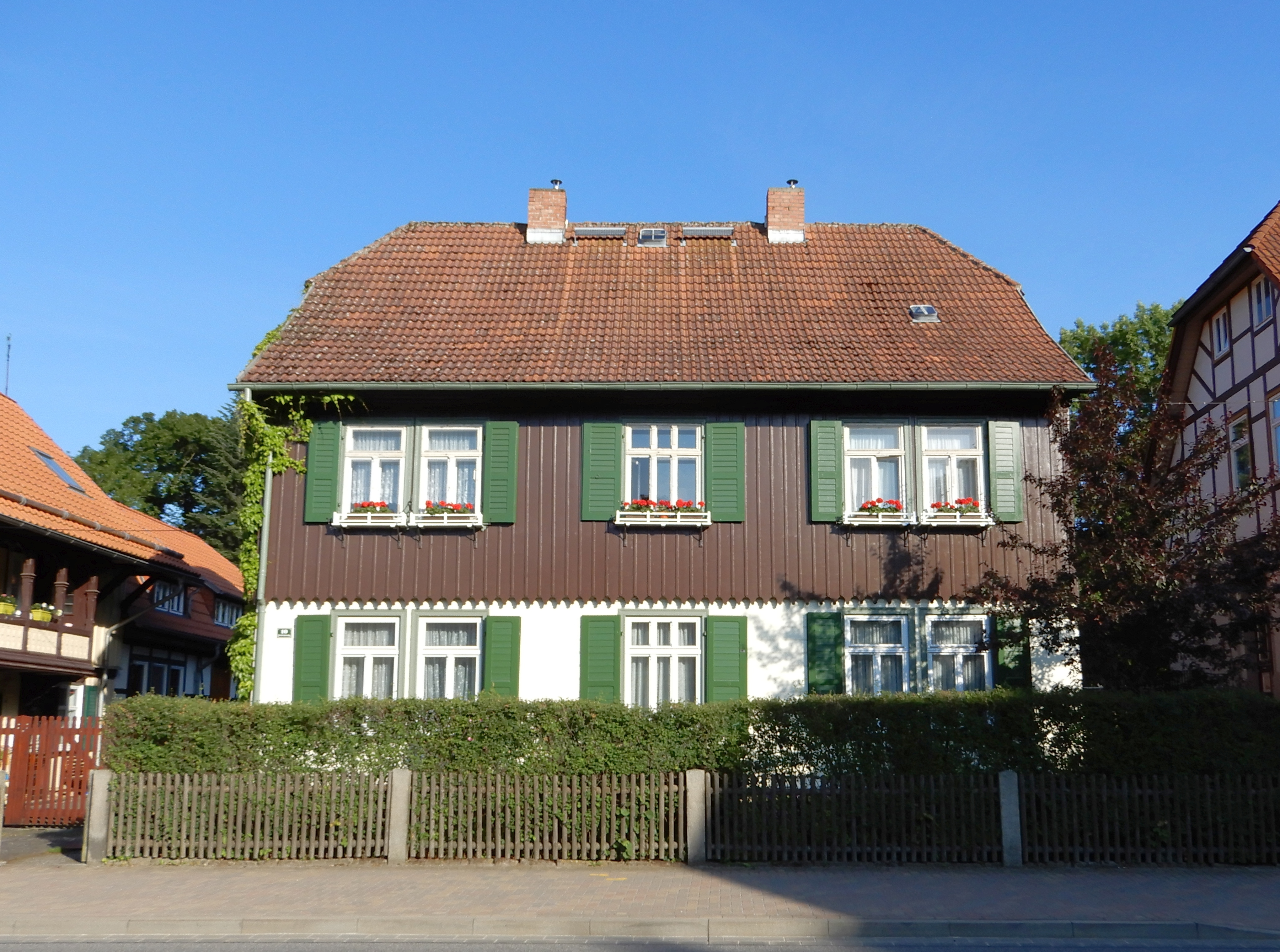 Ehemaliges Forsthaus in der Friedrichstraße in Hasserode